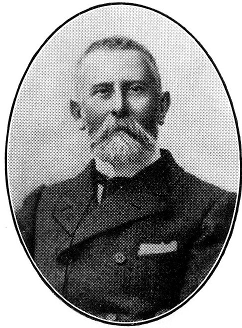 Portrait